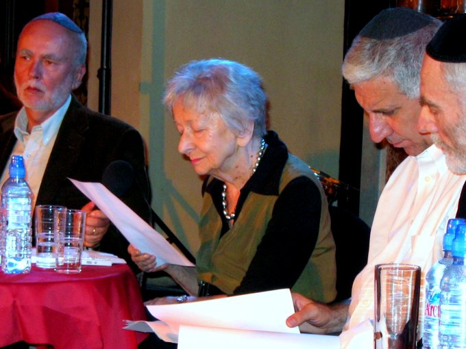 Wisława Szymborska, Polish poet, Nobel Prize in Literature 1996